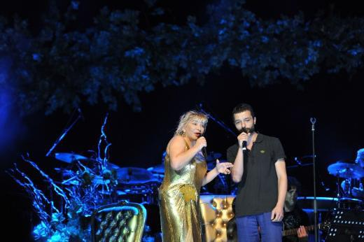 Cemiz Topuzlu Konser Salonu'ndan Sezen Aksu ve Mehmet Erdem sahne performansı, konserinden bir görünüm, 2012.